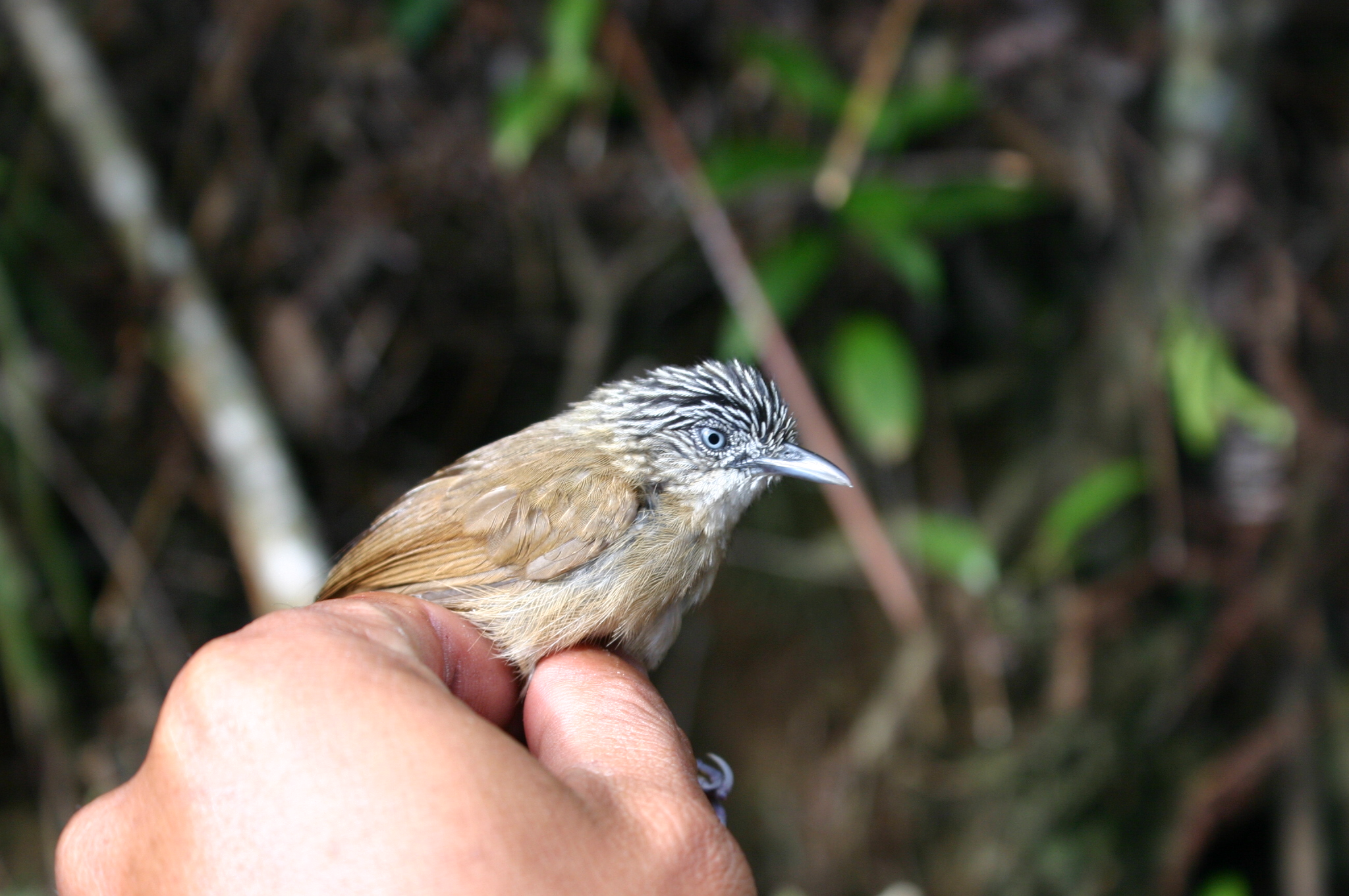 Macronus striaticeps